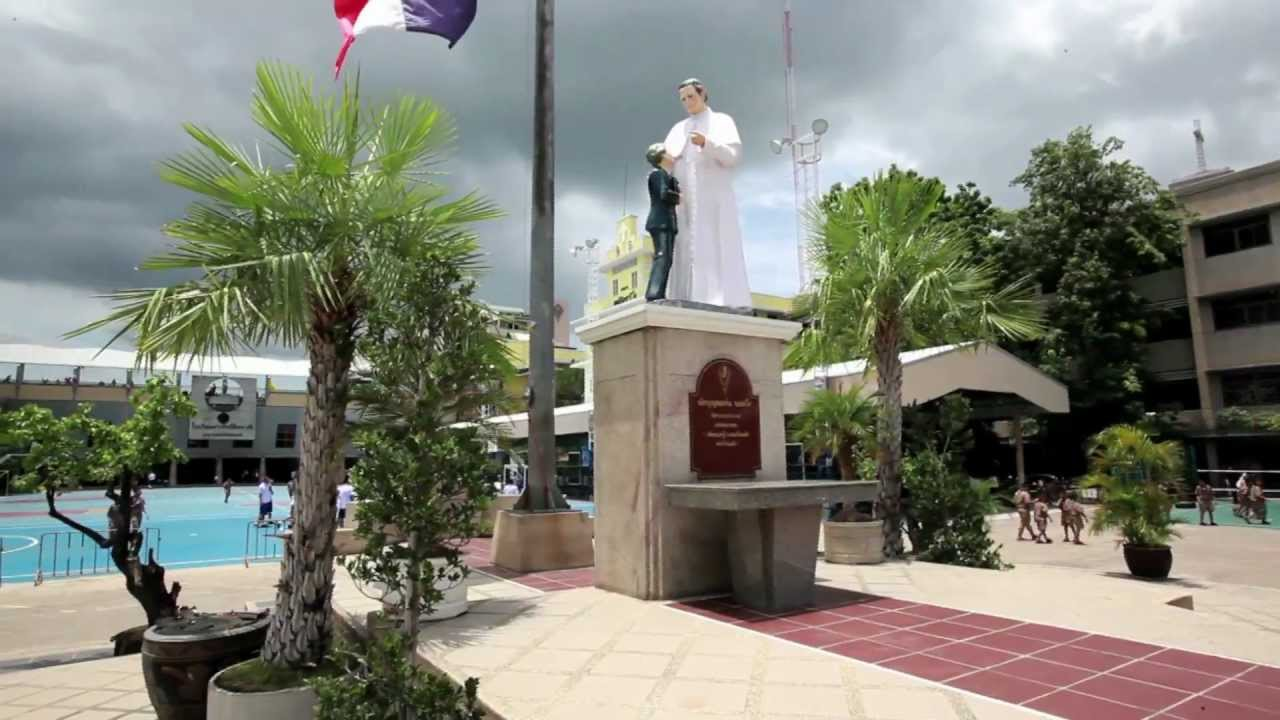 รูปปั้นนักบุญยอห์น บอสโก และนักบุญดอมินิก ซาวีโอ